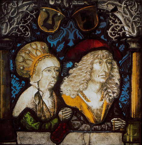 Dietrich von Plieningen und seine Gattin Anna